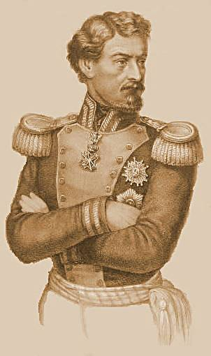 Saverio Pistolesi, Ritratto del generale Girolamo Calà Ulloa nel 1859, litografia.